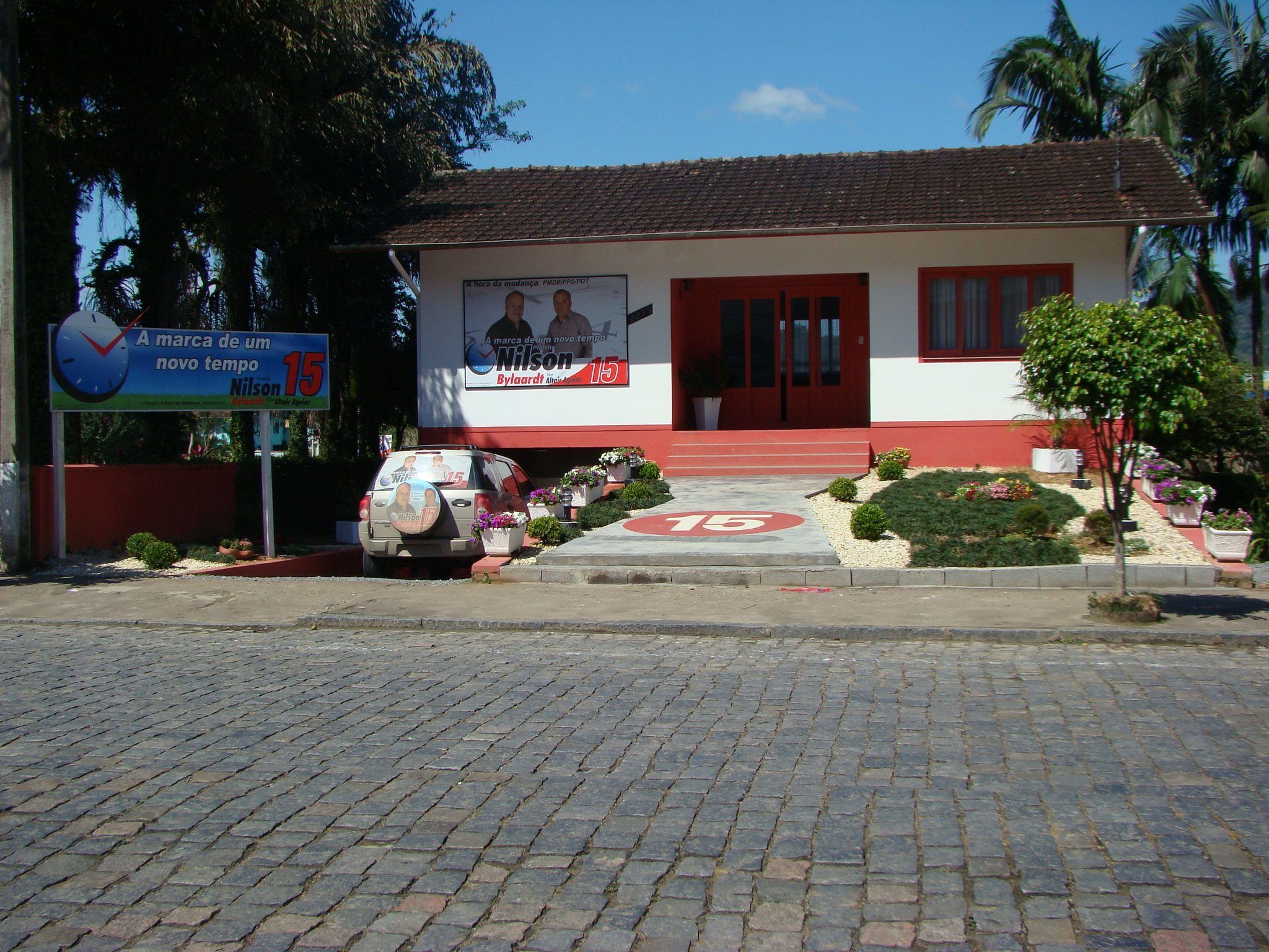 Comitê político da campanha eleitoral de 2008 do candidato vitorioso Nilson Bylaardt.